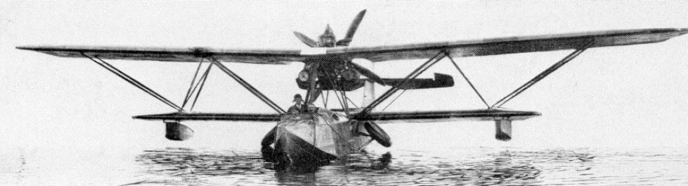 Fokker B.I flying boat